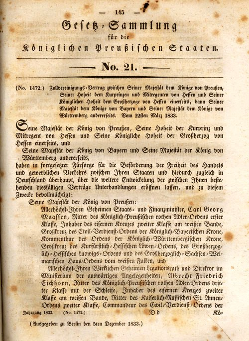 Zollvertragsverein von 1833